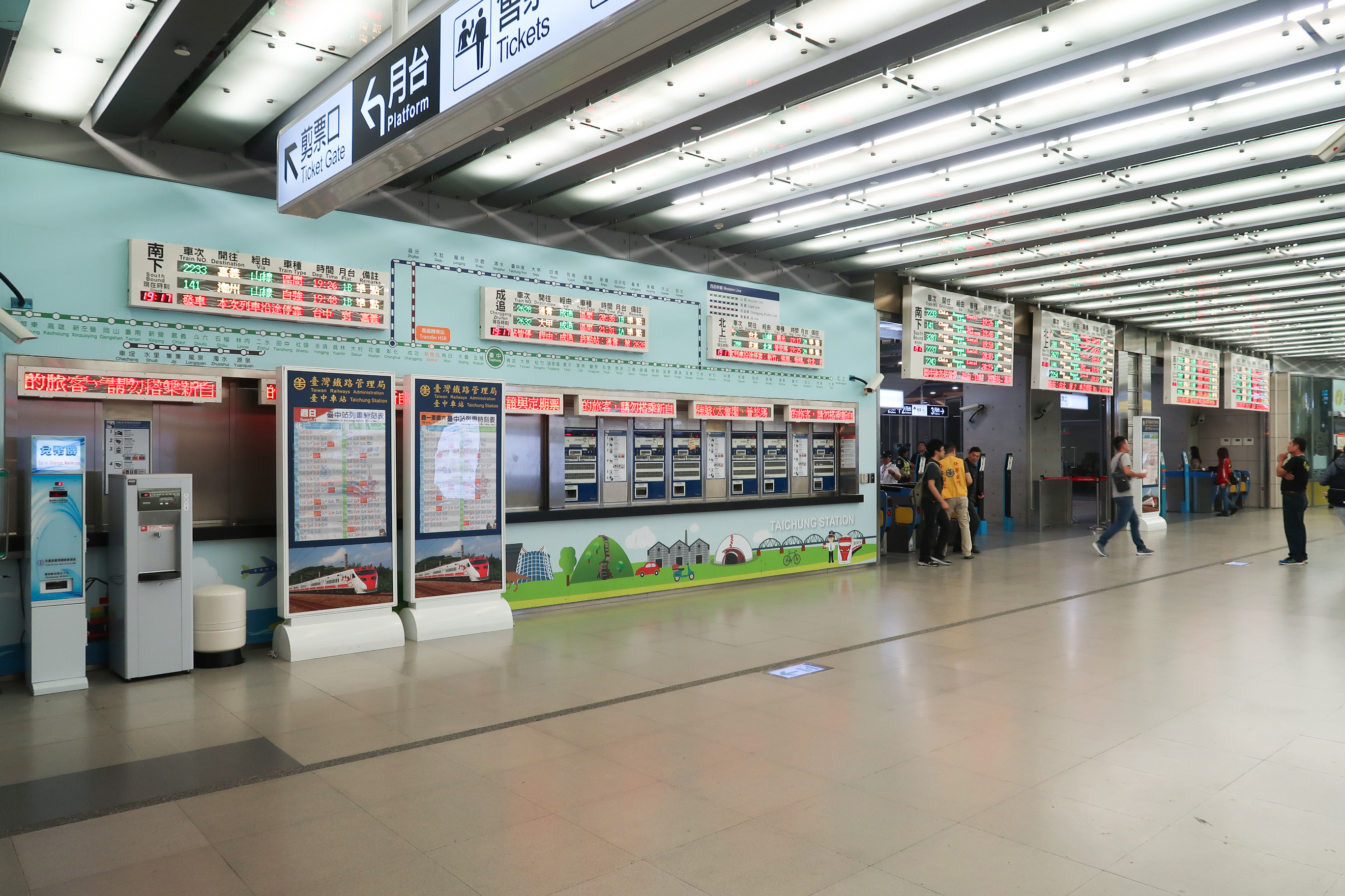 Taichung Station Ticket machine & gate